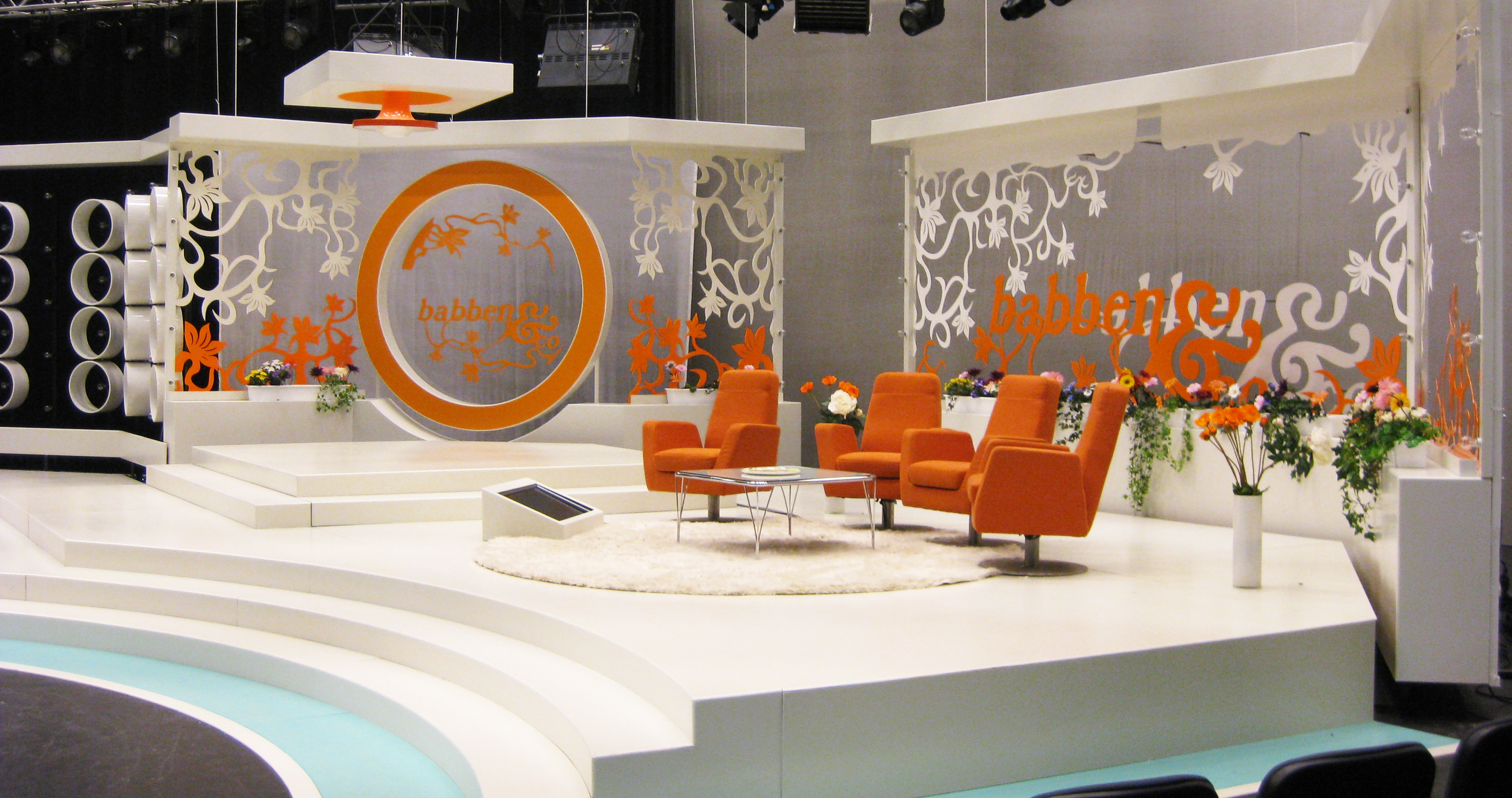 Studion till det svenska TV-programmet Babben & Co.